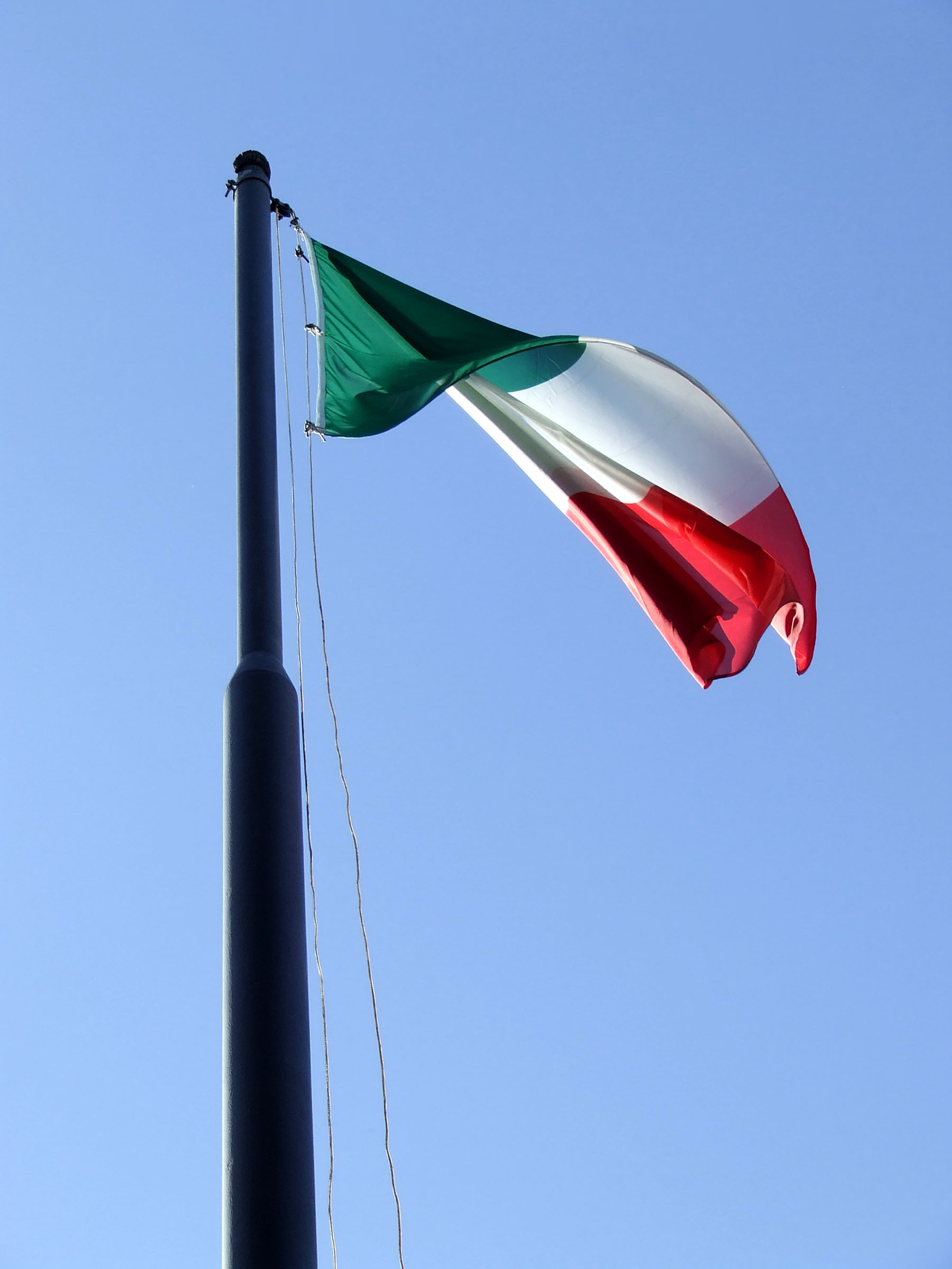 Tricolore italiano su cielo azzurro, foto scattata a Roma, via Garibaldi, in occasione della festa della Repubblica italiana (Ha collaborato l'utente:Jollyroger)